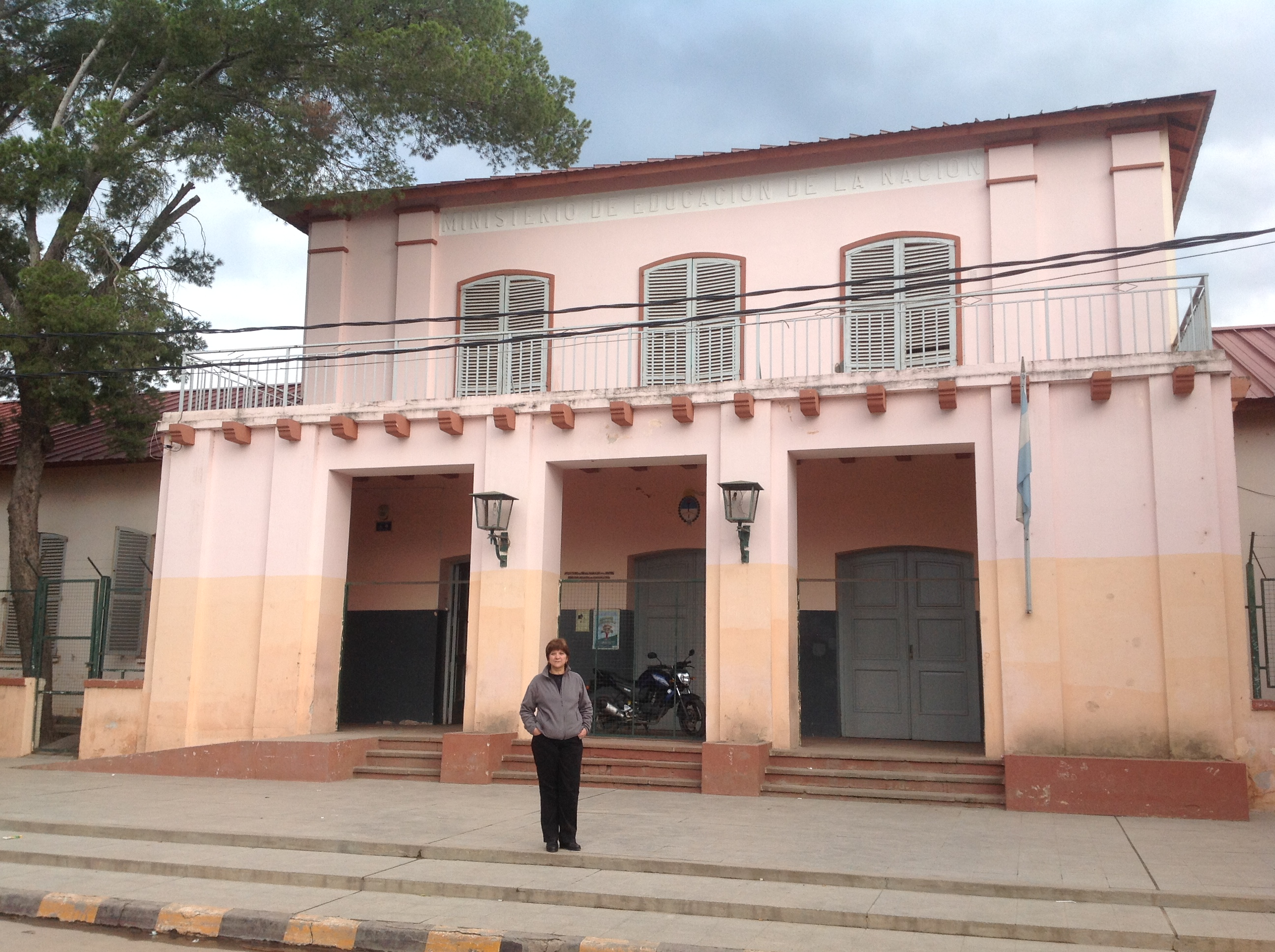 Argentina